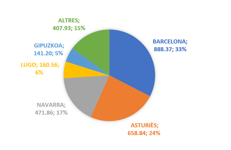 Gràfica circular de l'exportació de sidra per milers d'euros y percentage.